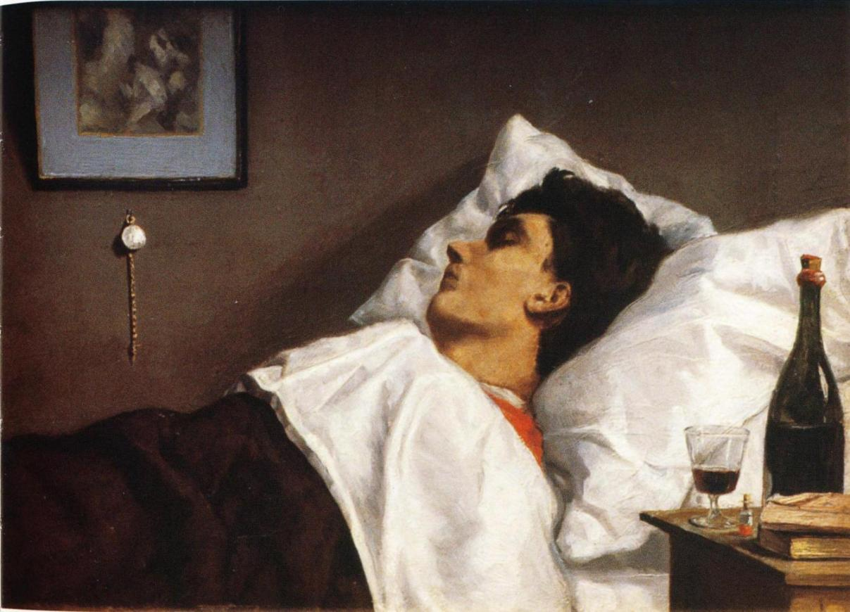 Otto Walleniuksen maalaus taiteilijaystävästään Albert Edelfeltistä, omistaja Cygnaeuksen galleria.